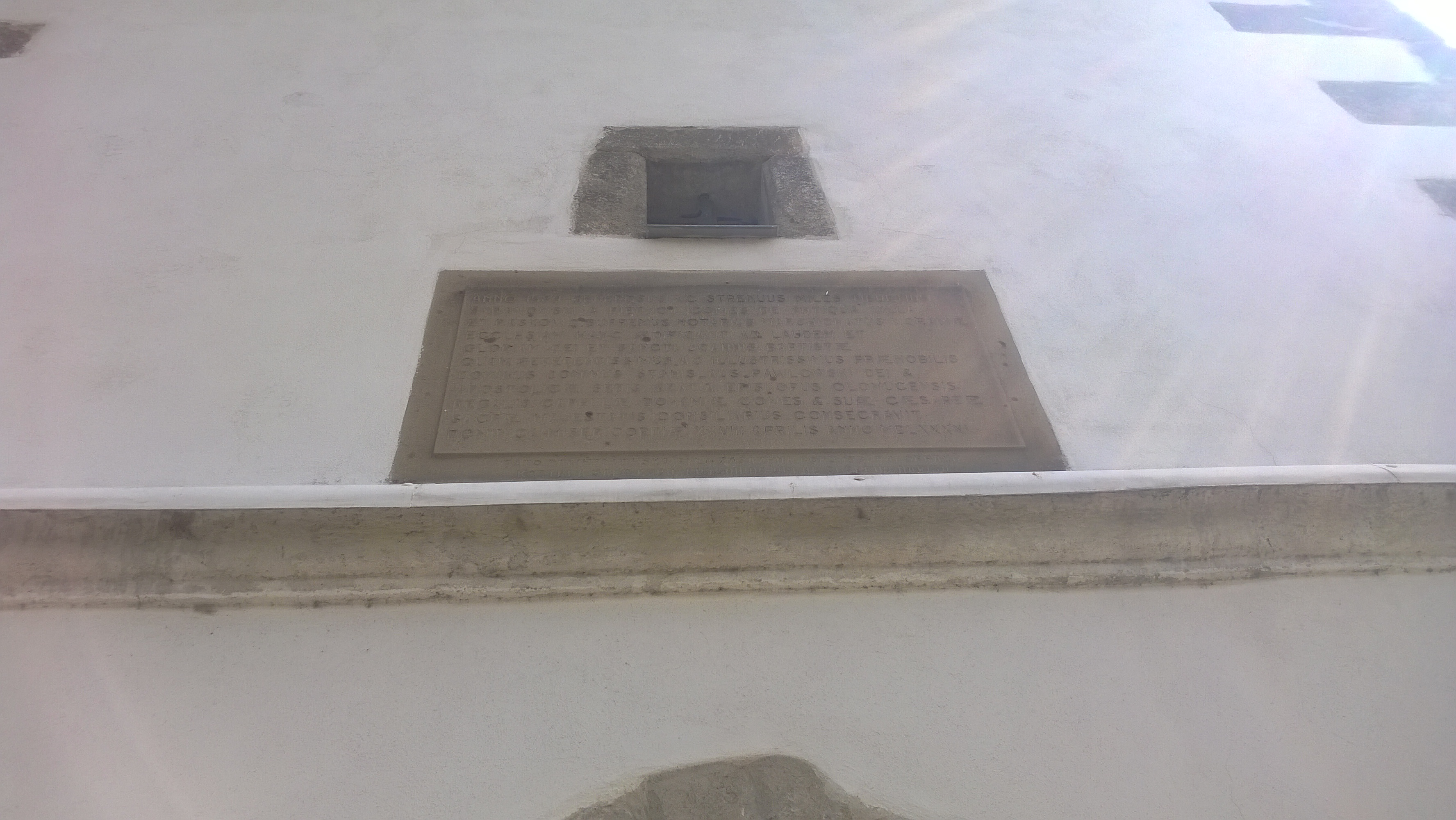 pamětní deska